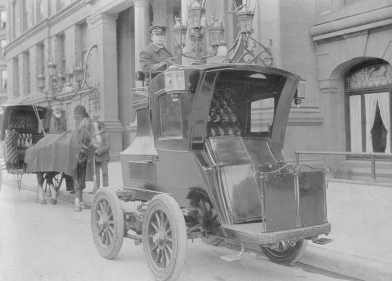 Kraftdroschke Scherl Bilderdienst Verkehrswesen Droschken, elektrische 3024 04, Morris ADN-ZB-Archiv Eine elektrische Droschke, bei der der Chauffeur auf einem erhöhten Sitz hinter seinem Fahrgast thront. Aufnahme 1904 3024-04 [Elektrische Kraftdroschke] Information added by Wikimedia users.E.V.C. hansom cab, built 1899-1906 by the Electric Vehicle Company and it's successor, the Columbia Automobile Company in Hartford, CN (USA)